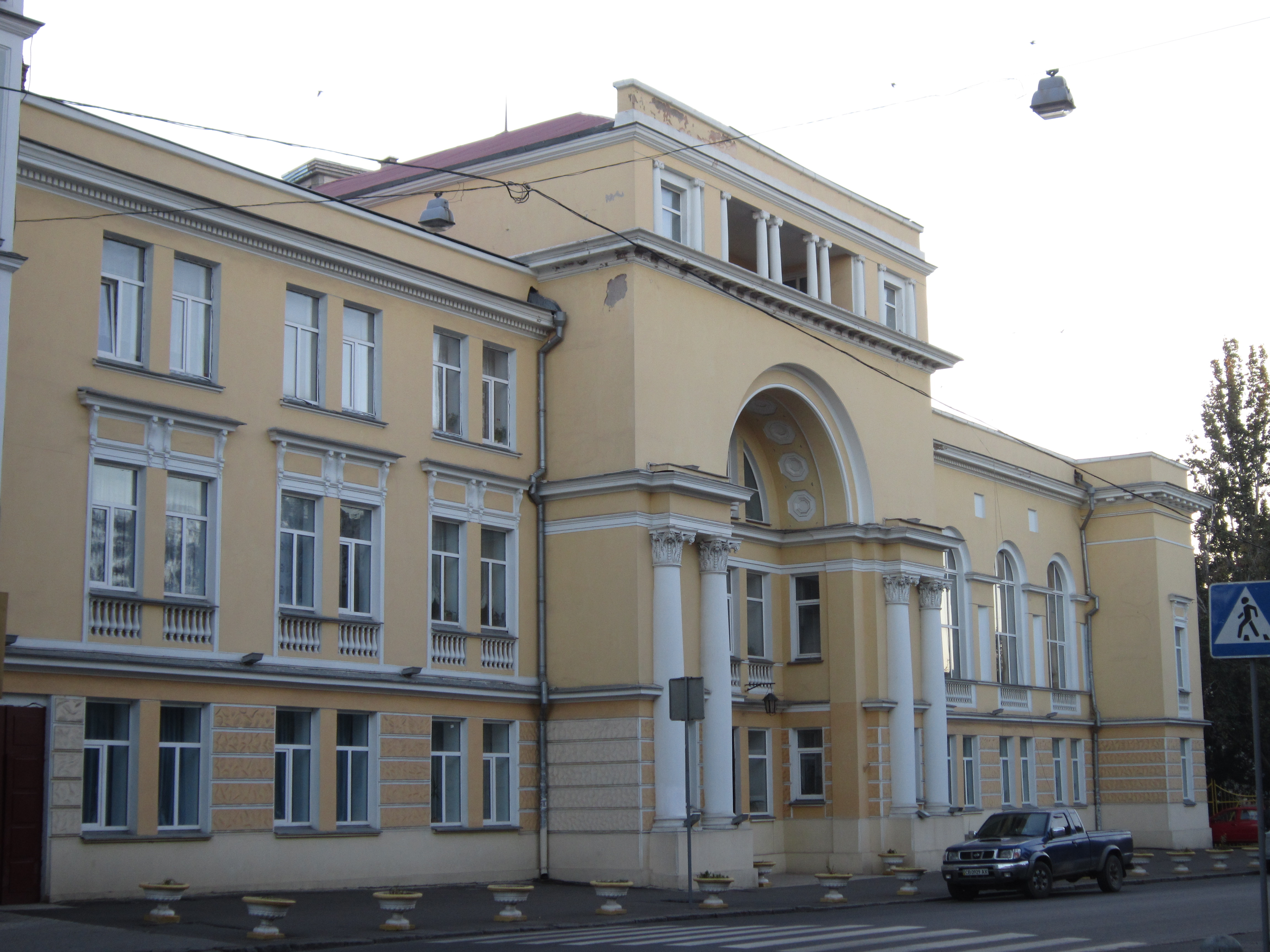 Будівля музичної школи ім. П.С.Столярського, у якому працював П.С. Столярський - професор, Одеса, Сабанєїв Міст, 1